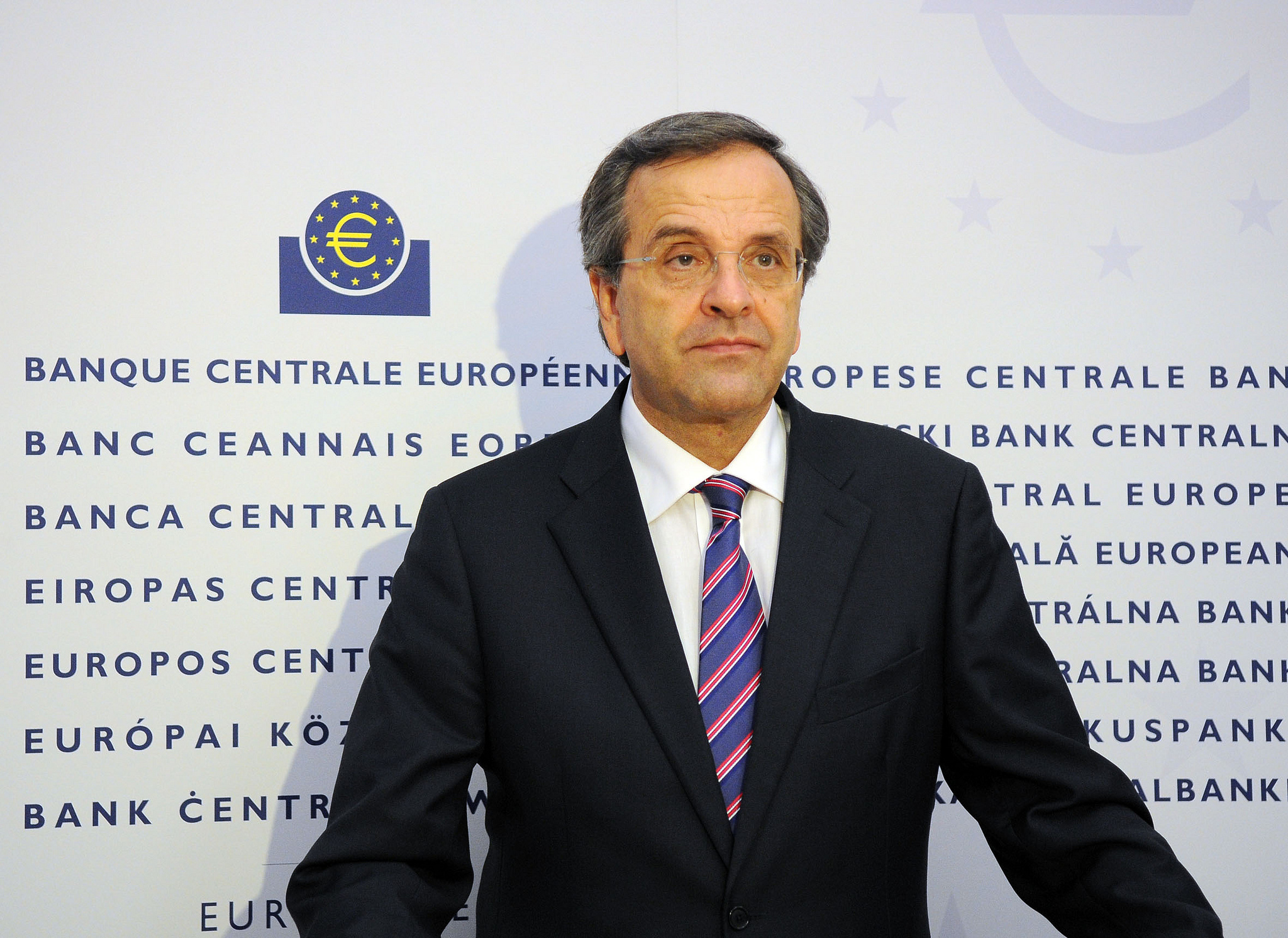 Mario Draghi - Αντώνης Σαμαράς